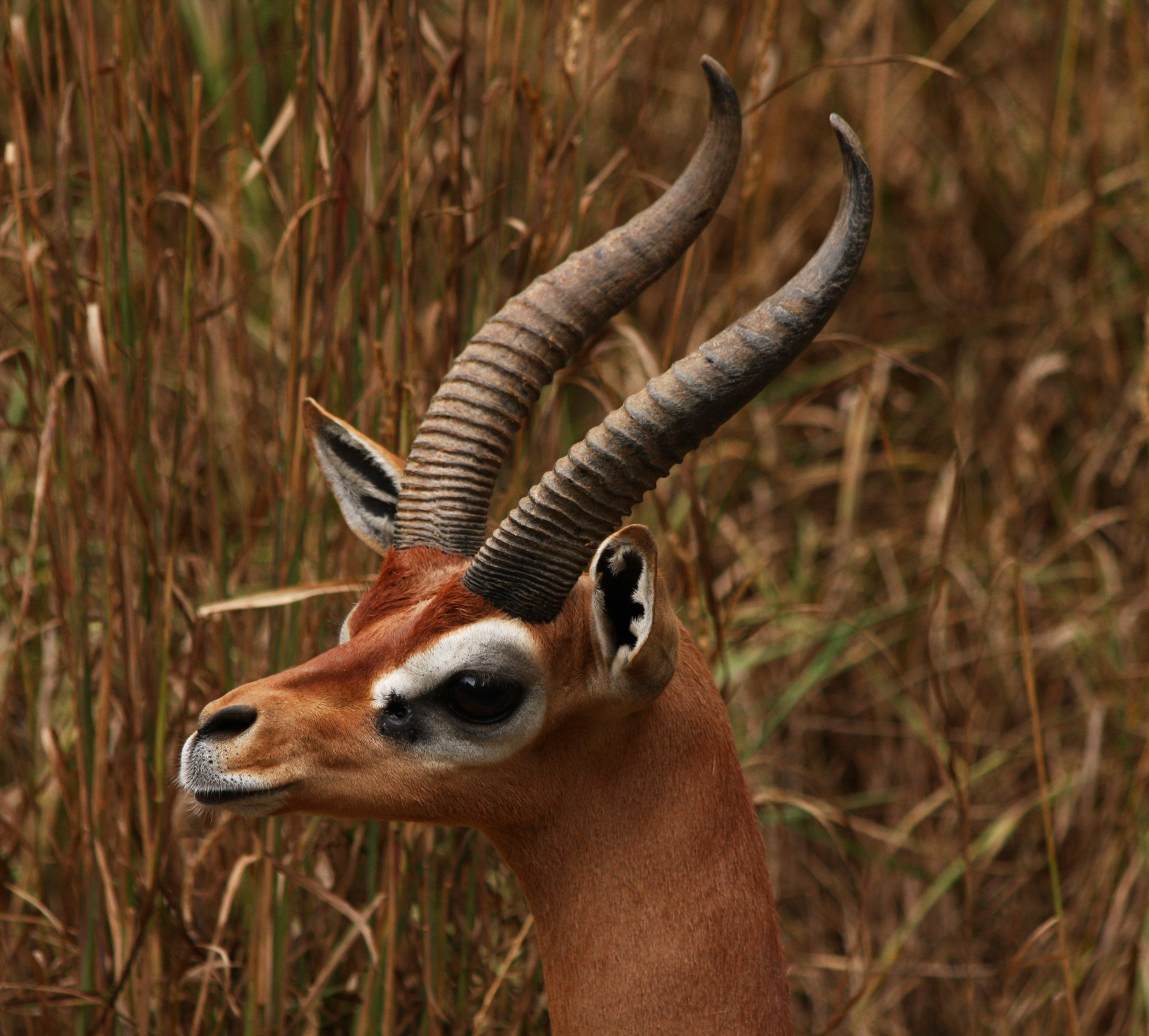 Gerenuk